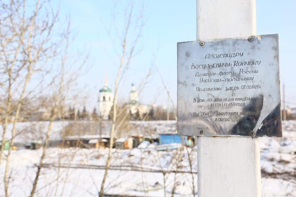 Табличка на кресте на месте упокоения Колчака и Пепеляева на берегу Ангары